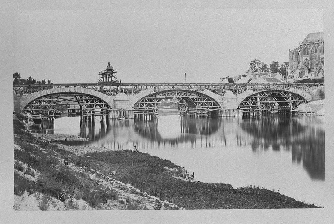 Pont de Mantes sur la Seine reconstruit du 13 novembre 1873 au 6 novembre 1874. Cintres et pont de service - Vue prise d'aval - Rive droite.